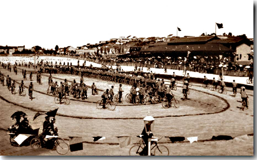 Vista Geral da Parte Interna do Velódromo